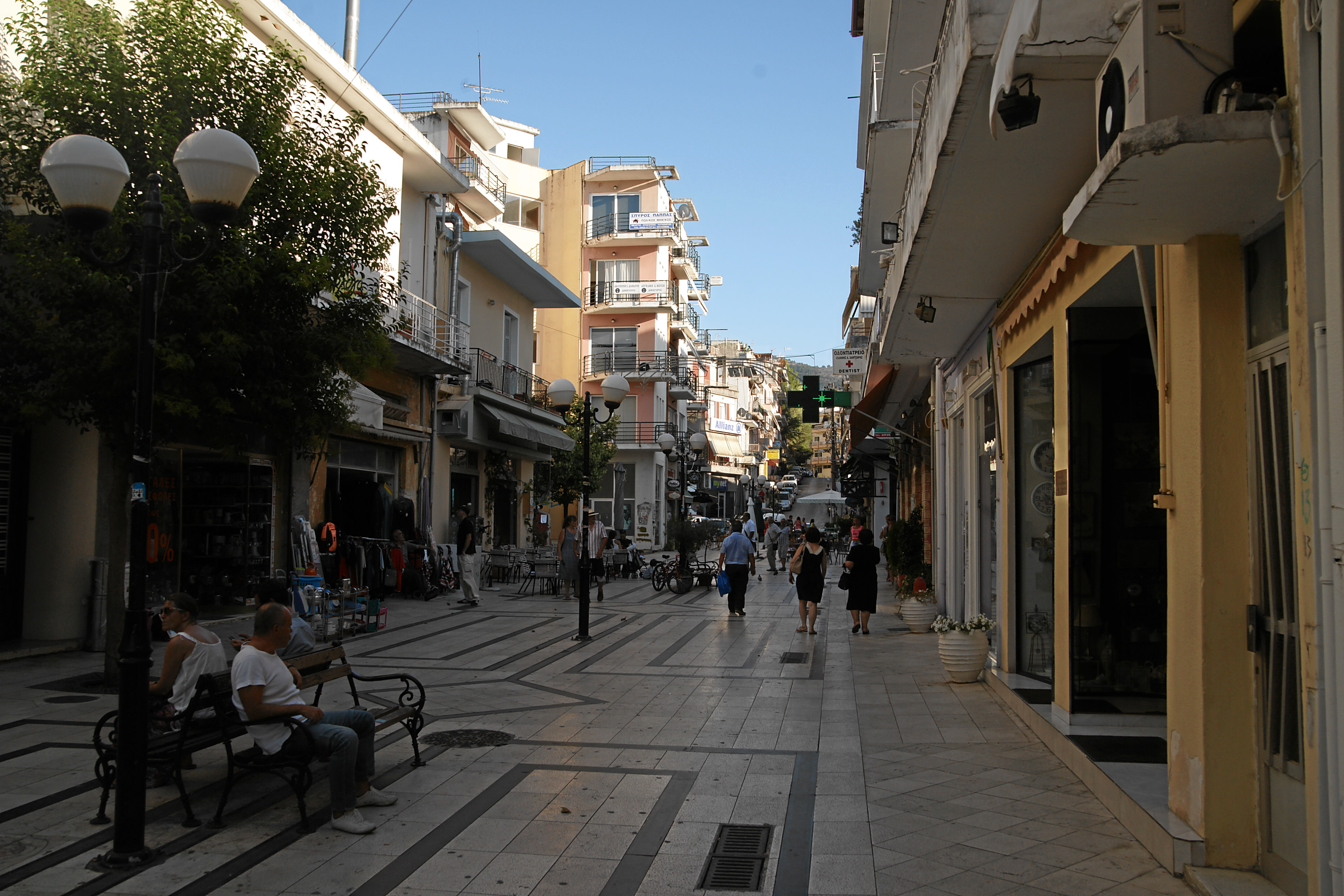 Stadtzentrum Igoumenitsa